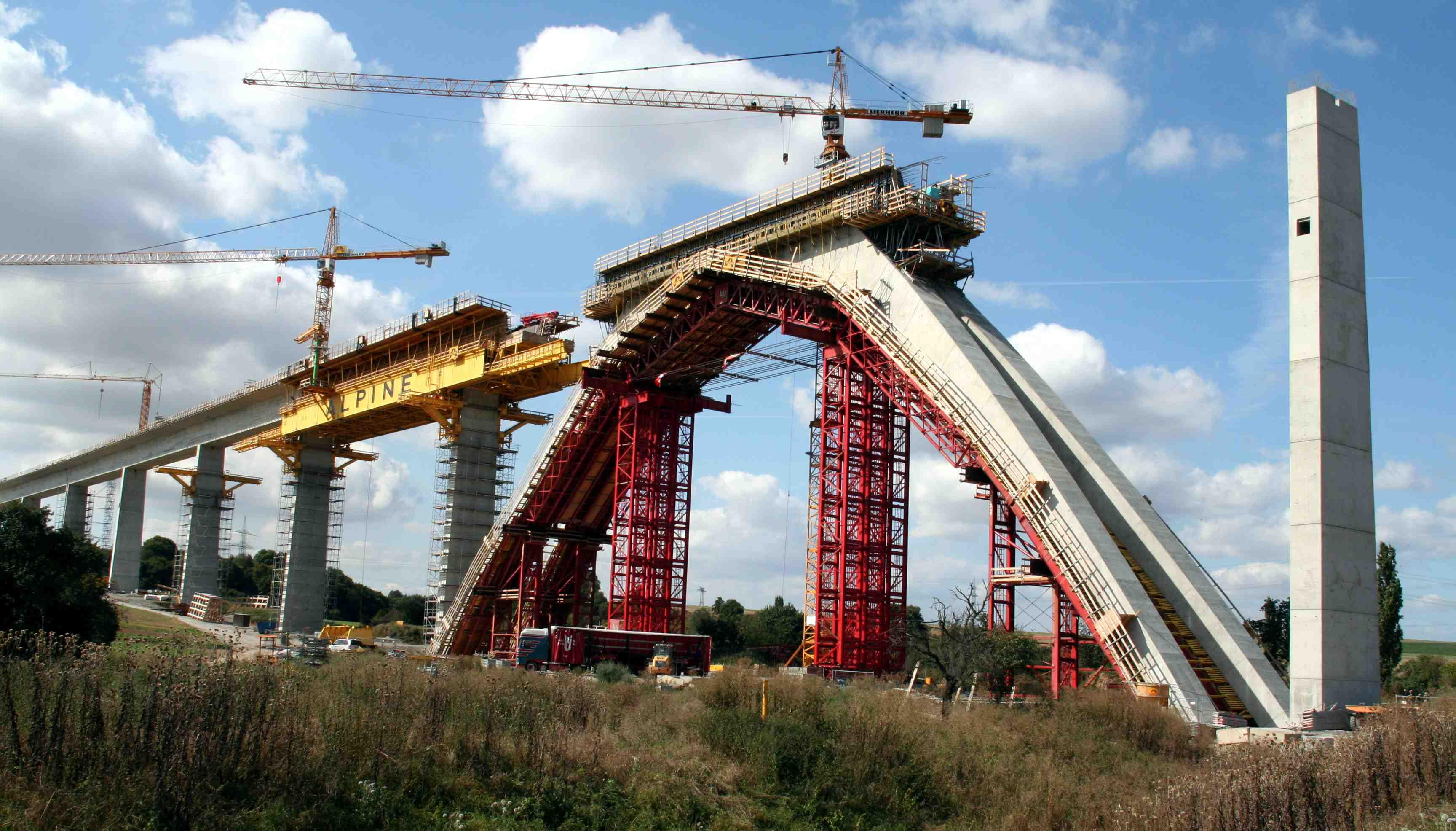 Unstruttalbrücke bei Karsdorf in Sachsen-Anhalt